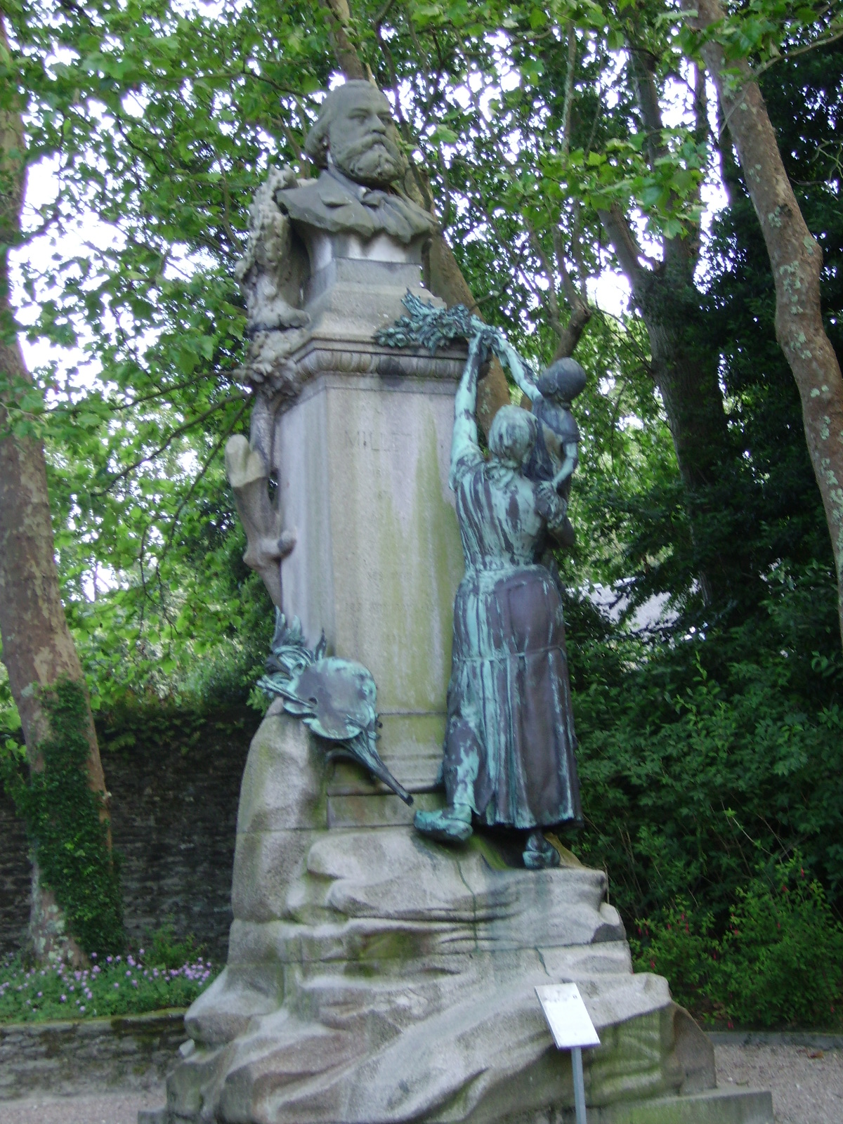 Buste de Jean-François Millet situé dans le Jardin public de Cherbourg-Octeville